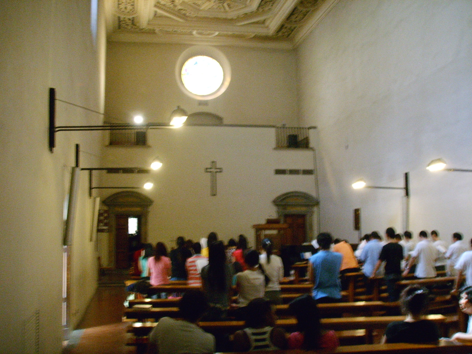 San jacopo tra i fossi